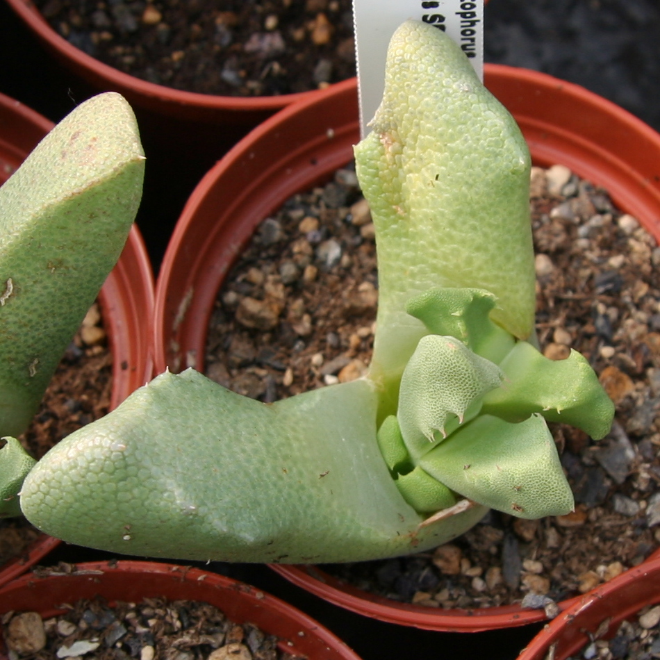 Odontophorus nanus in Kultur bei Kakteen-Haage in Erfurt